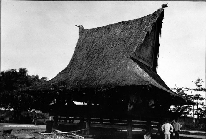 Foto. Een Karo Batak loods